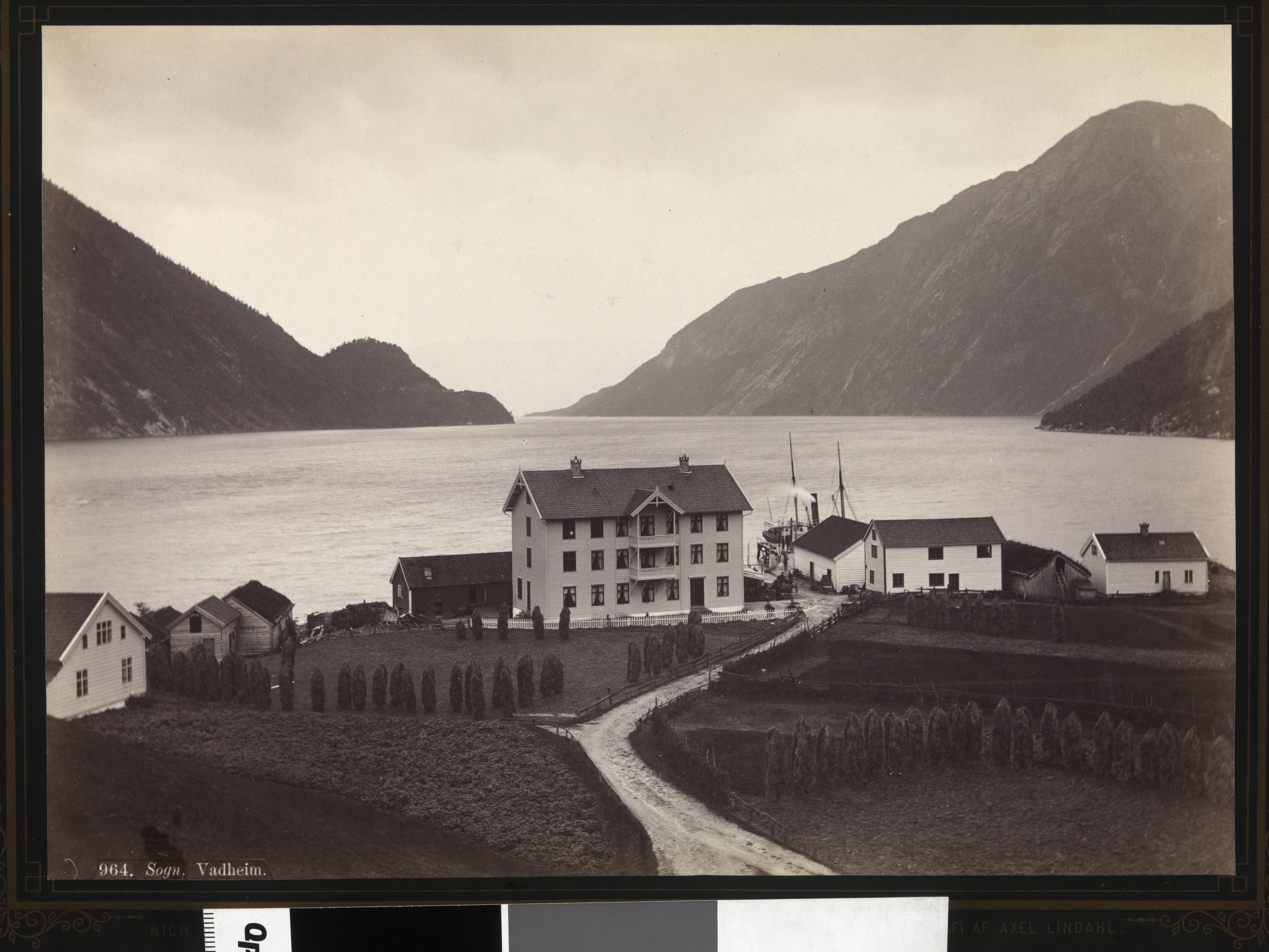 Bildet er hentet fra Nasjonalbibliotekets bildesamling Vadheim, Høyanger, Sogn og Fjordane